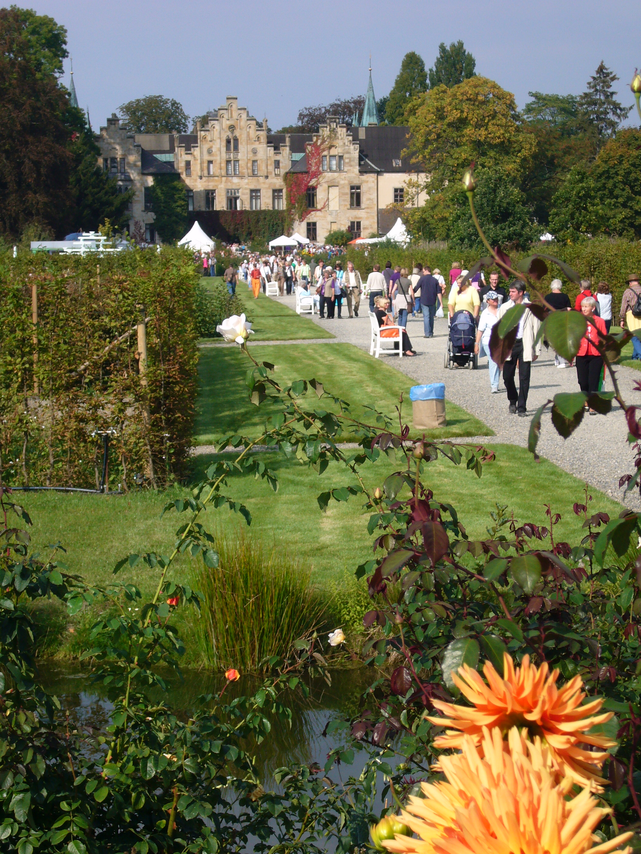 Schloss Ippenburg